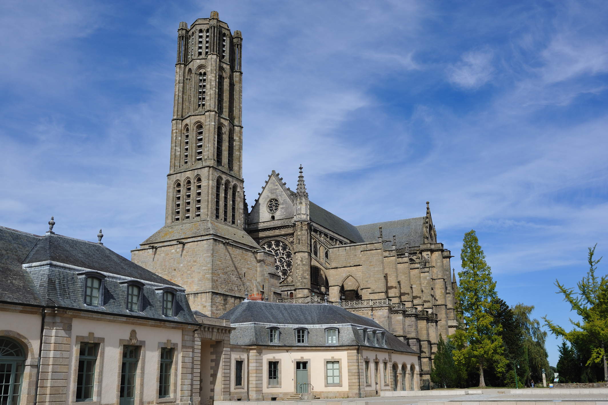 Cathédrale Saint-Étienne, Limoges, Haute-Vienne, France